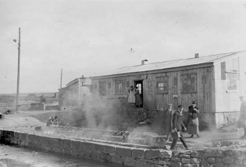 Polarfahrt mit dem Dampfer "München".- Heiße Quellen bei Reijkjavik 17. Juli - 12. August 1925 Information added by Wikimedia users.